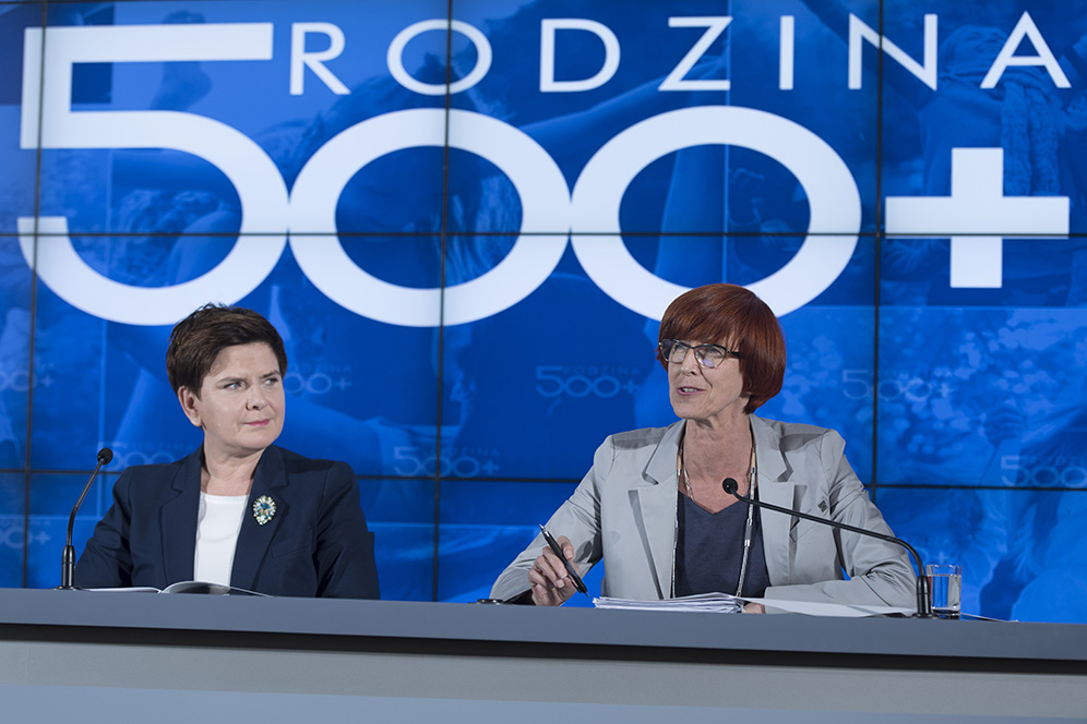 Beata Szydło i Elżbieta Rafalska, konferencja prasowa o programie Rodzina 500+.